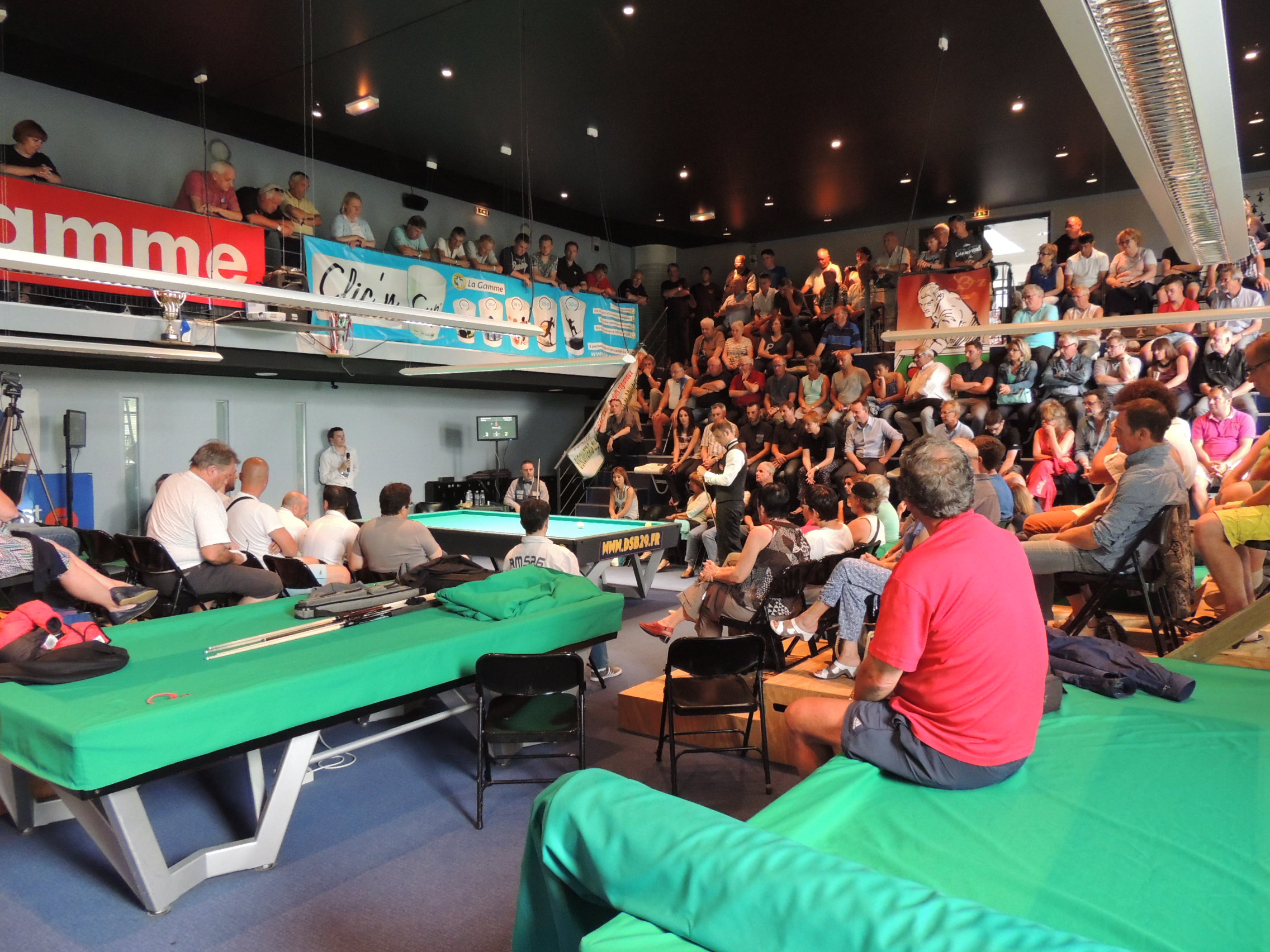 Salle du Douarnenez Sport Billard lors du National PREVALRISK 2015